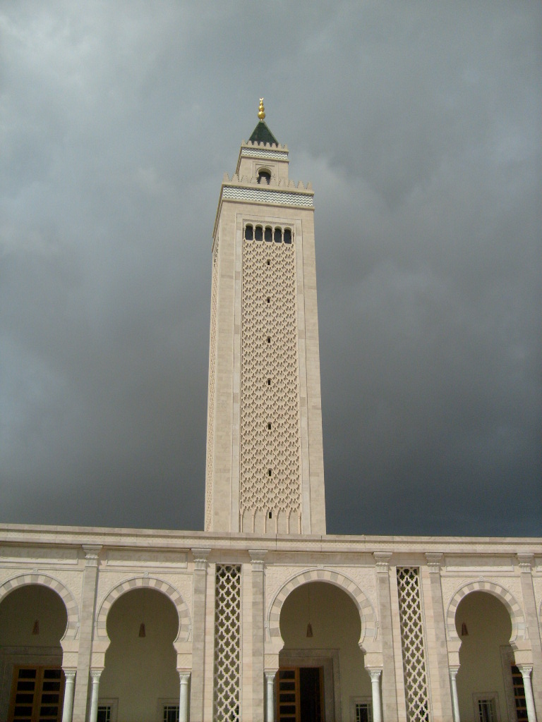 Minaret de la mosquée El Abidine de Carthage